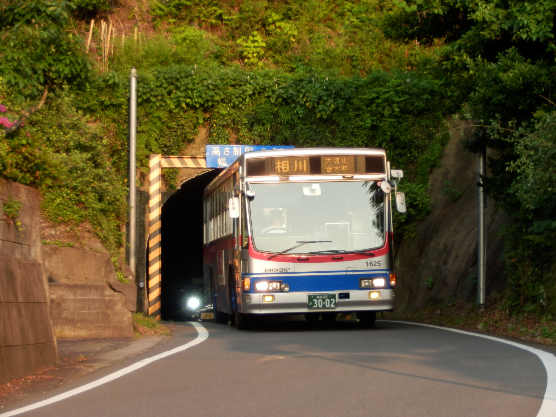 県道112号線、式見トンネルを通過する長崎バスの大型車両。